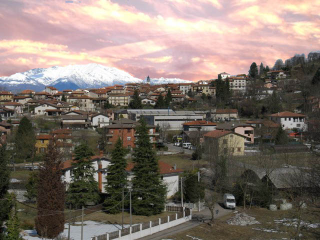 panorama bedero valcuvia, licensa libera.